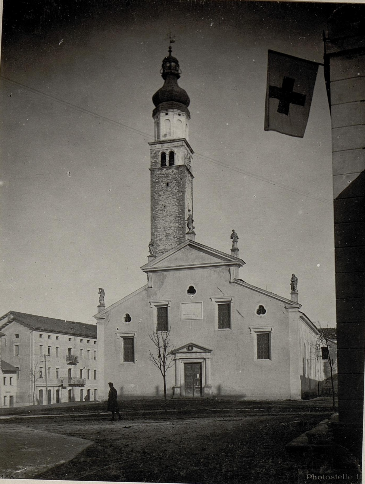 Lentiai. Kirche.